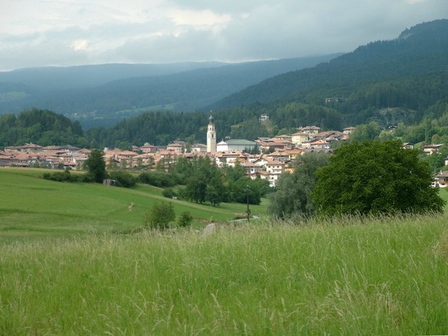 Panorama del paese di Fondo, fotografato da sud